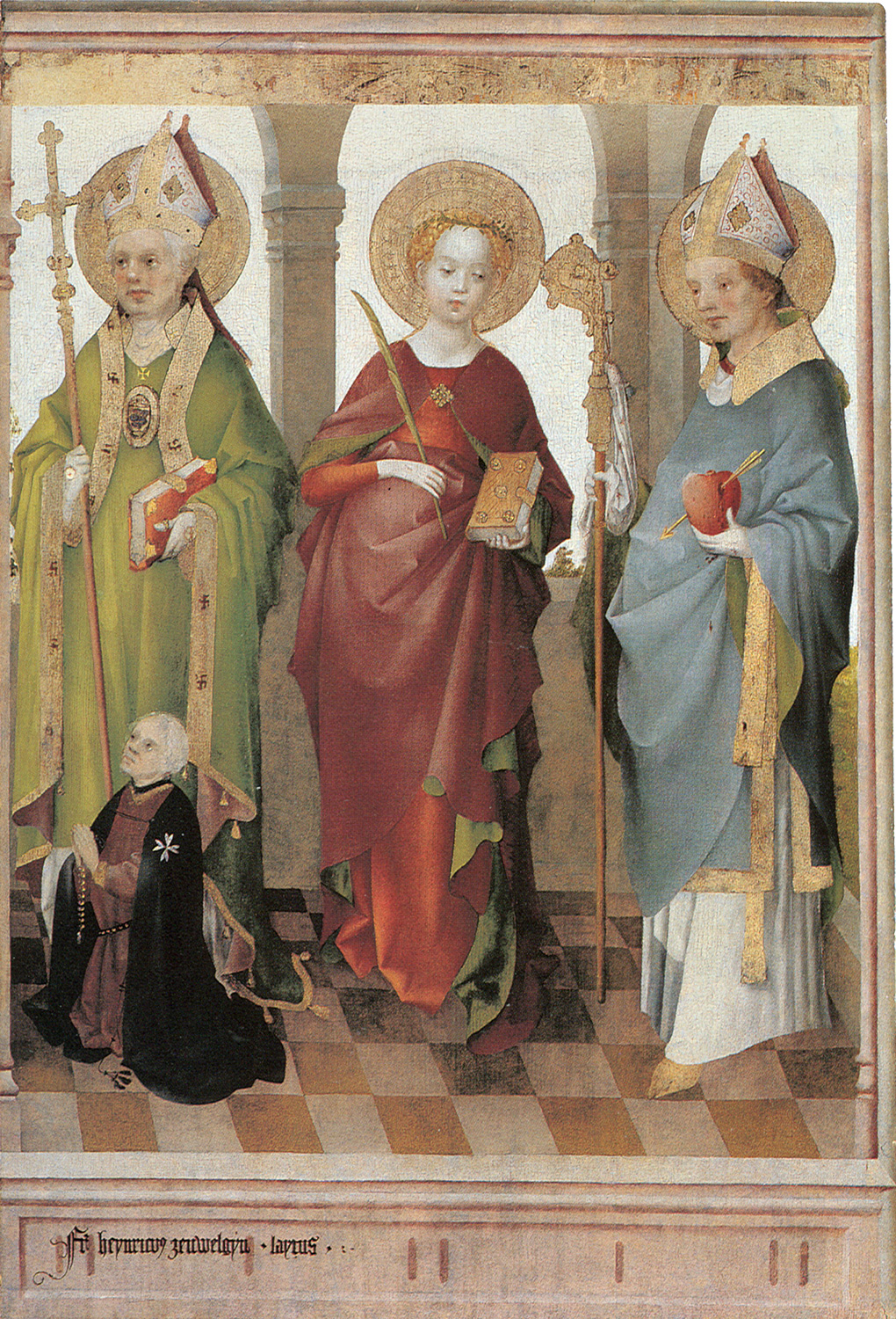 Ambroise et Cecile